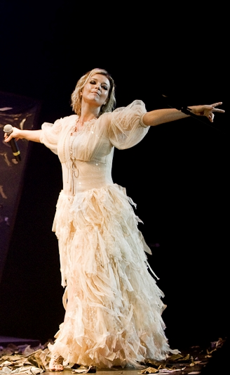 Luiza Possi ao vivo no Rio de Janeiro em 2009.